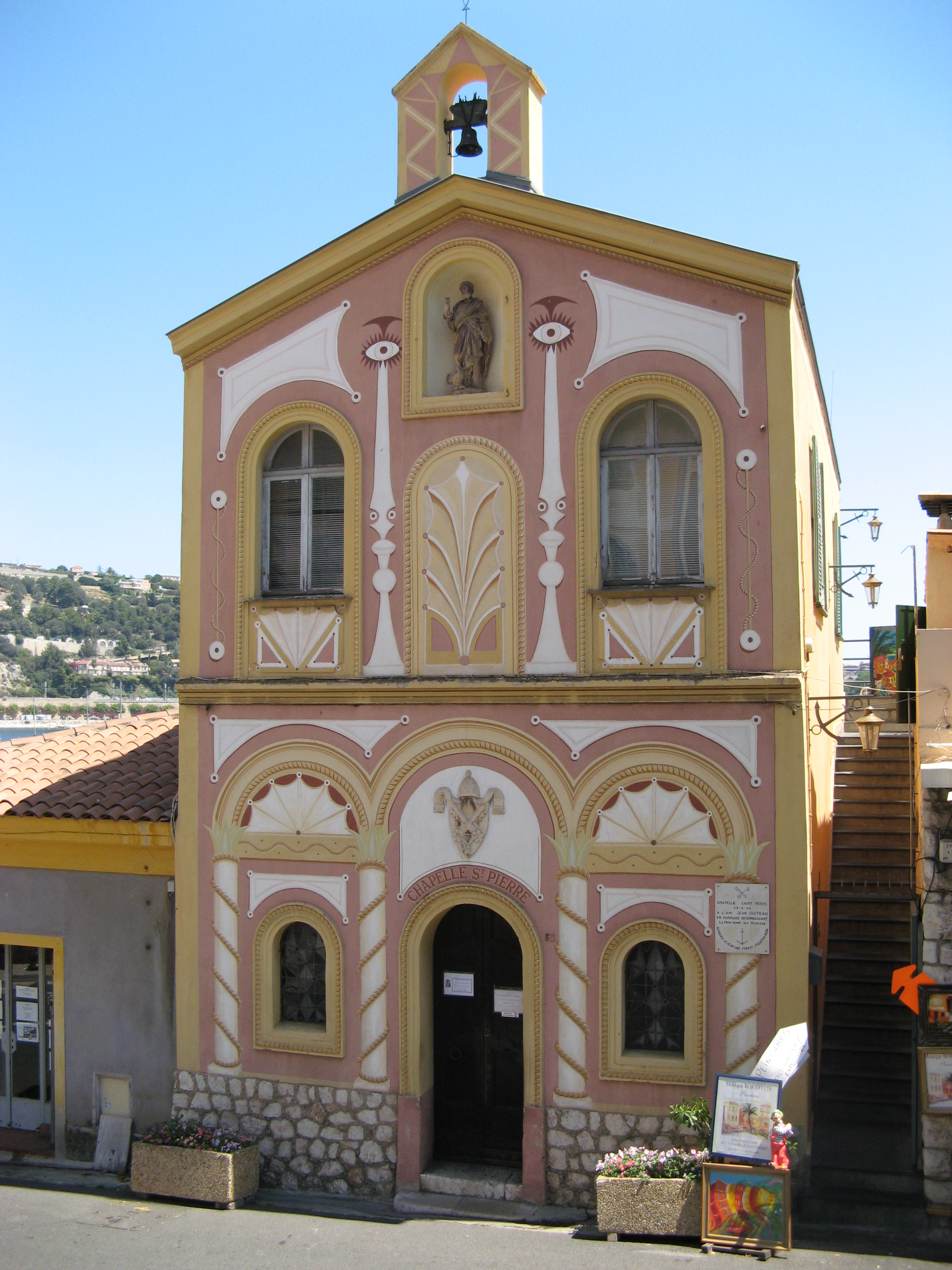 Capella di San Pietro a Villafranca sul Mare in Costa Azzurra